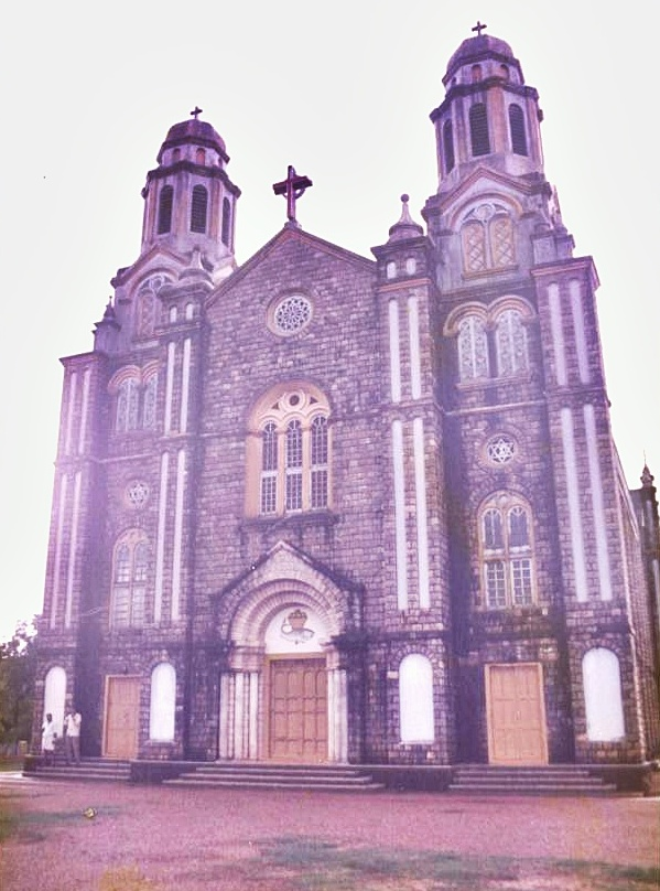 St. Mary`s Syro-Malankara Cathedral Trivandrum, Kerala